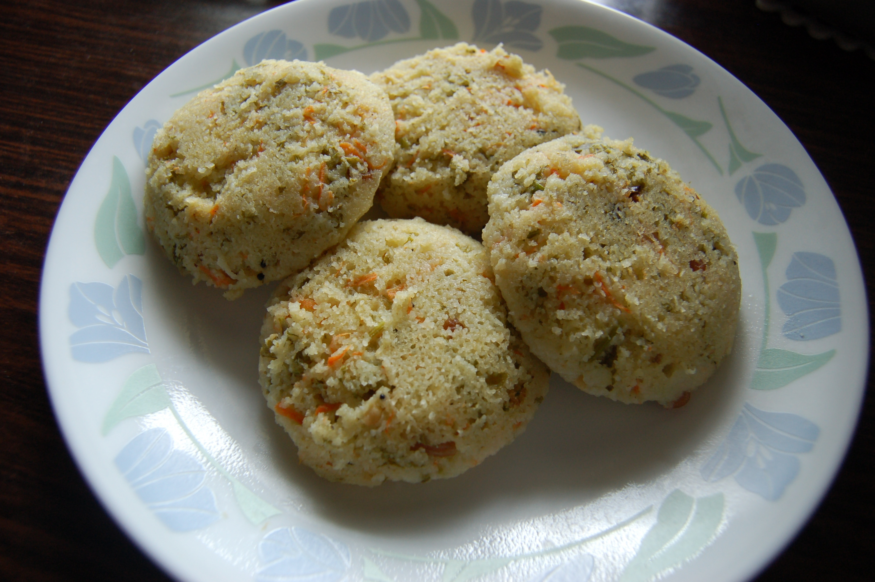 Rava Idli